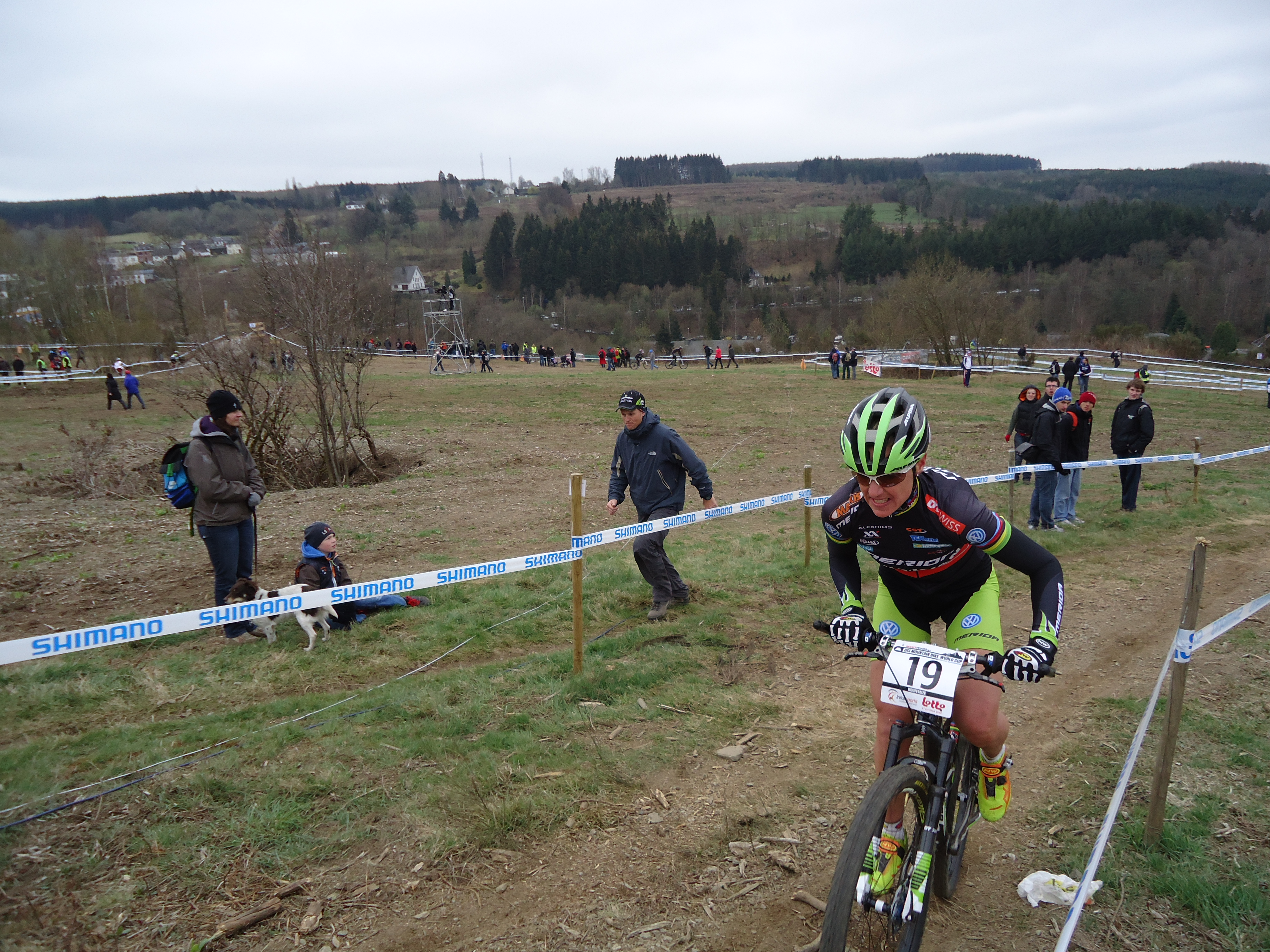 Gunn-Rita Dahle in actie tijdens de race XCO World Cup MTB Houffalize(BEL)